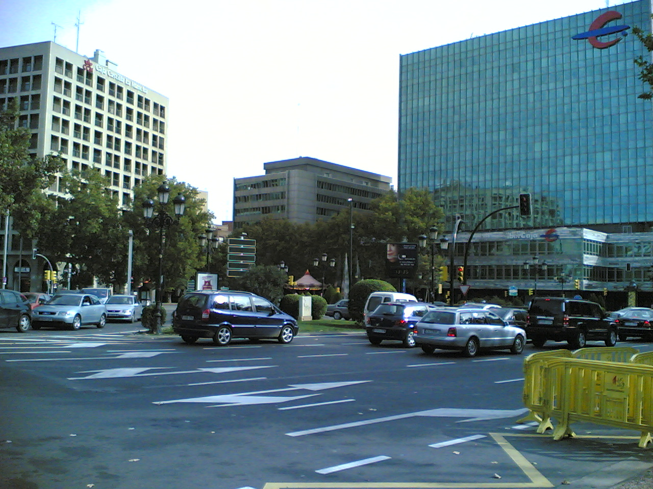 Edificio central de Ibercaja, y edificio de Caja Castilla La Mancha, en Zaragoza